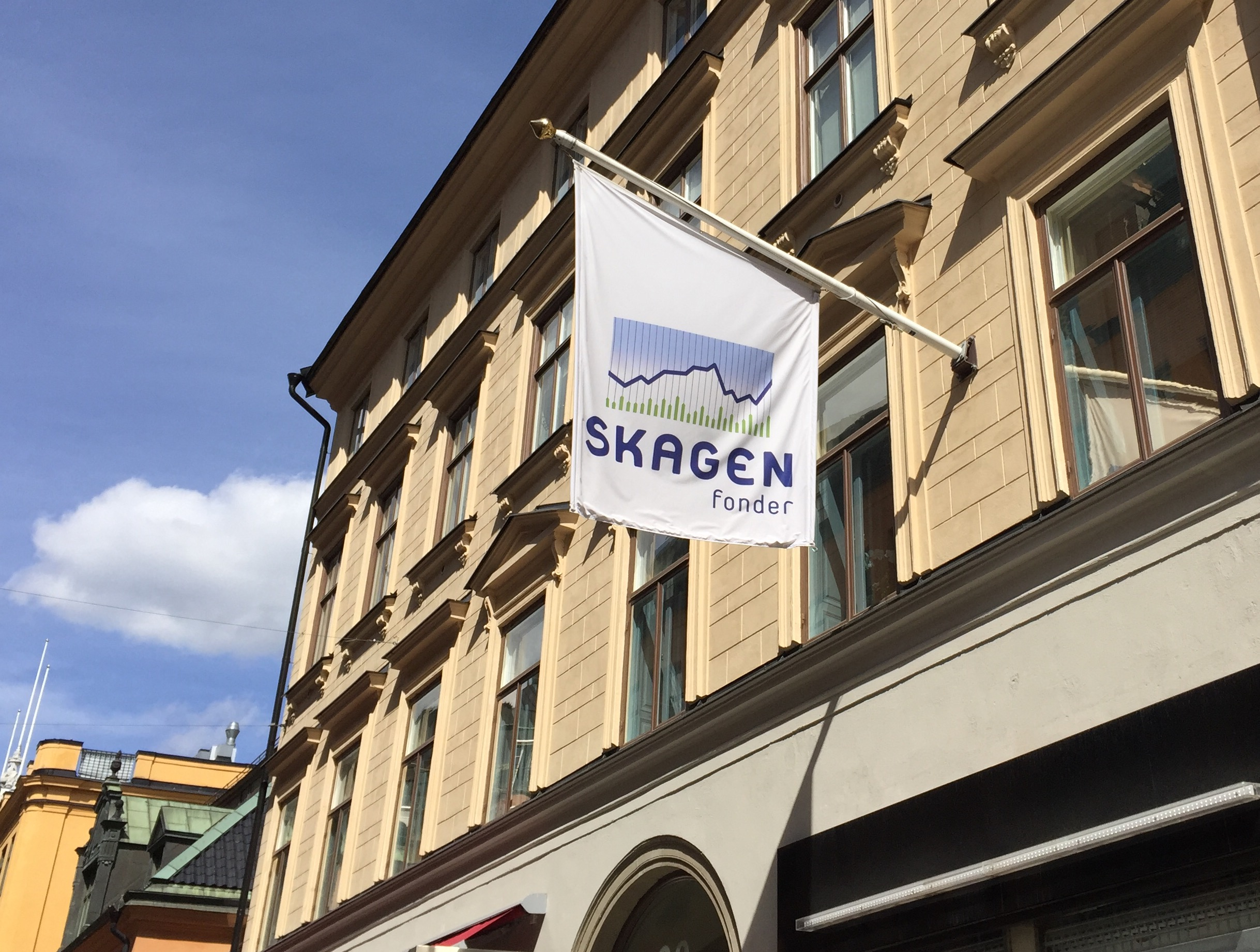 Skagen Fonder, Drottninggatan Stockholm. Husets Byggnadsår 1789, arkitekt J D Degenaer, byggherre M Brandelius. 1860 ny fasadutformning (arkitekt C N Söderberg).